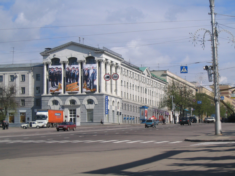 Курск